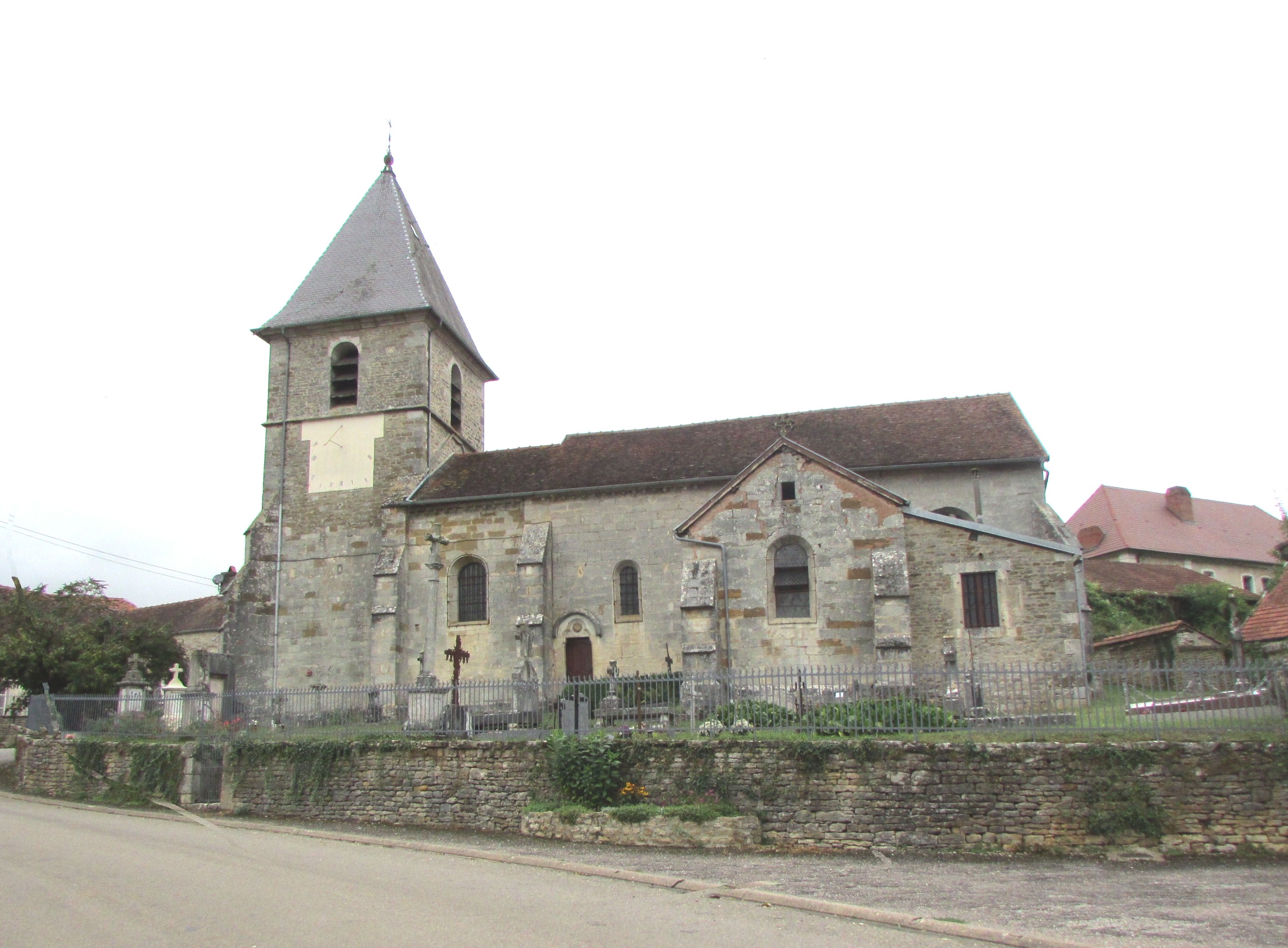 Vue de l'église.